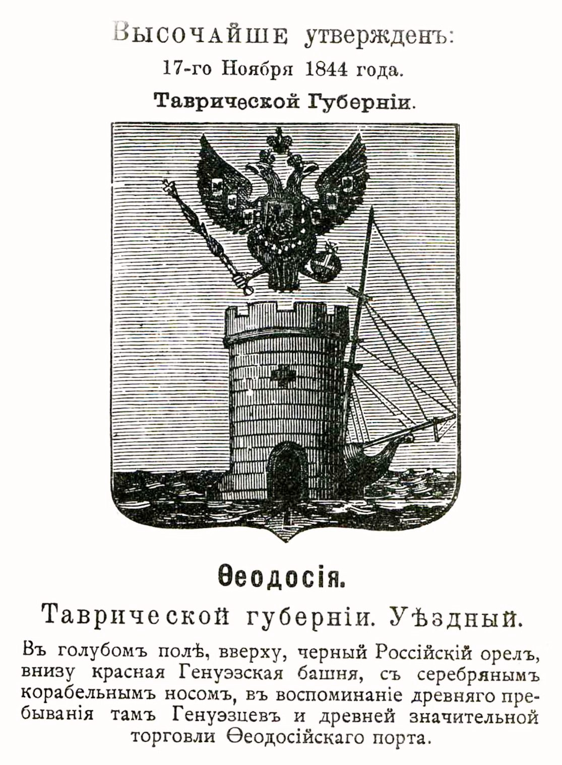 Official Russian Empire coat of arms Feodosia. Герб города Российской Империи Феодосия Таврической губернии 1844 года с официальным описанием в Гербовнике Винклера.